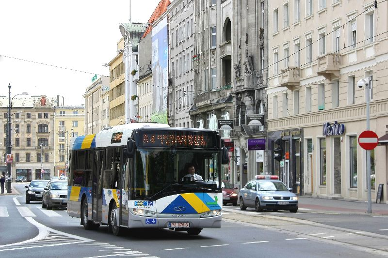 Alpino 8,6